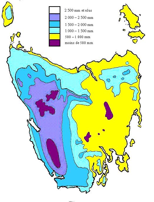 Répartition des précipitations en Tasmanie